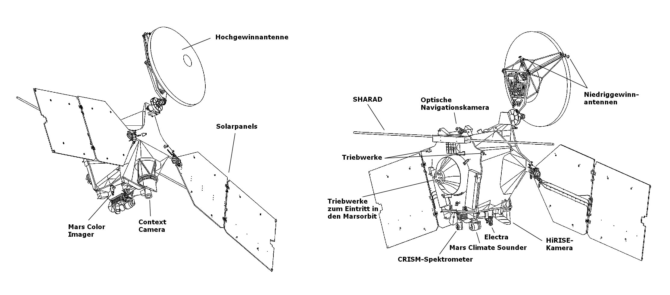 Diagramm von Mars Reconnaissance Orbiter